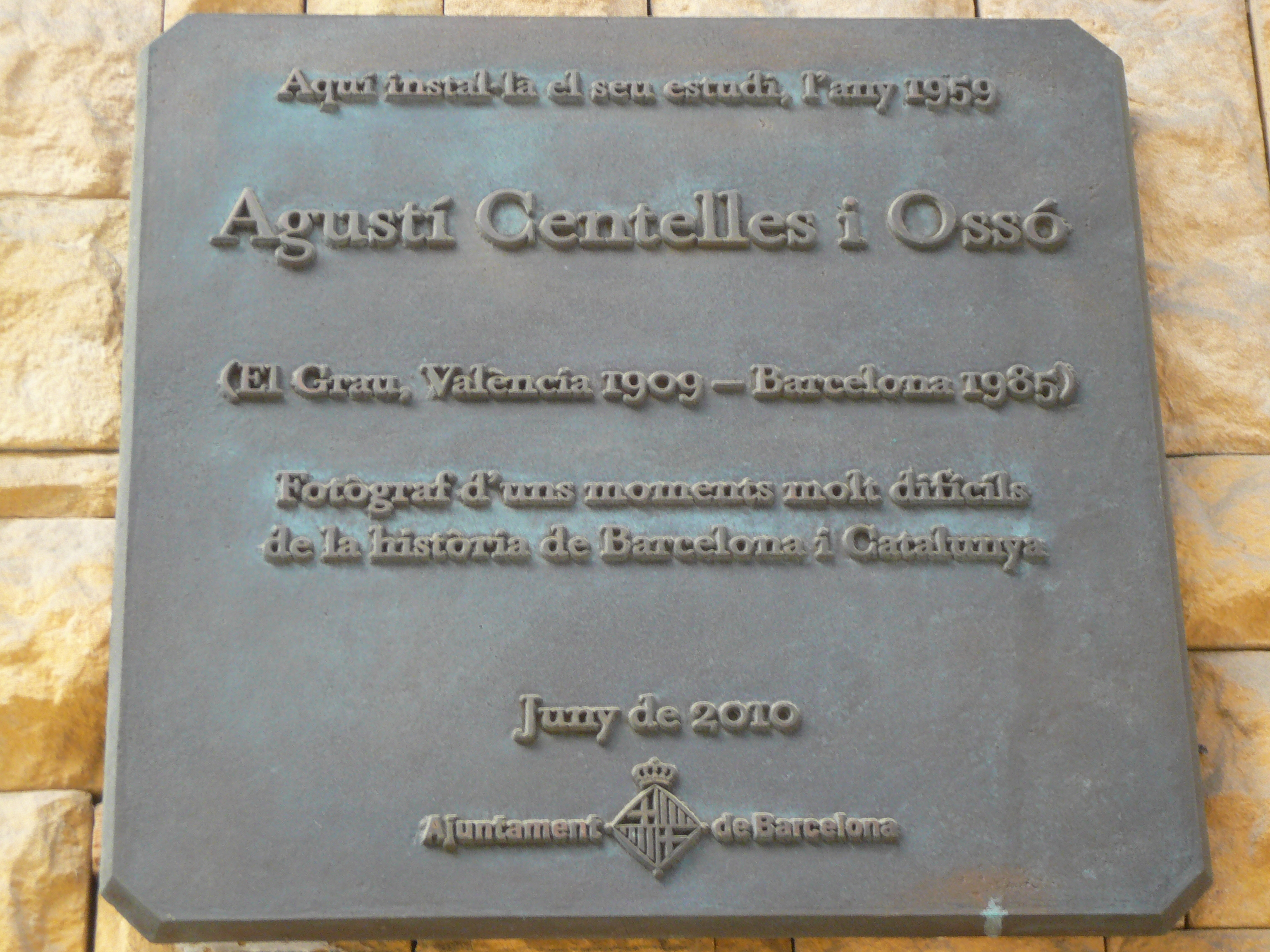 Placa en commemoració d'Agustí Centelles i Ossó.